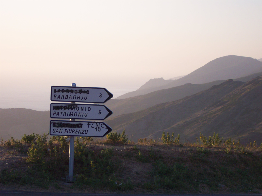 Panneaux routiers sur la Route Départementale D 81 entre Bastia (à l'Est) et St-Florent (à l'Ouest). Selon les distances indiquées sur ces panneaux, la photo devrait avoir été prise à proximité du Col de Teghime. Les sommets à droite de la photo pourraient être le Monte Secco ou le Monte Sant'Angelo. Révélatrice de l'activisme des nationalistes corses, l'inscription "FLNC" peinte sur un panneau est accompagnée des noms de lieux en français systématiquement barrés. (A la date de l'import depuis Flickr par Marc ROUSSEL, l'auteur avait légendé sa photo ainsi : "A sign near Bastia")